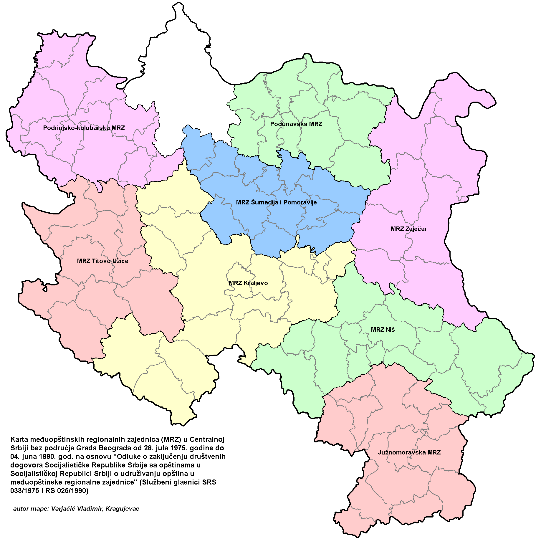 Међунаопштинске регионалне заједнице у СР Србији 1975. године